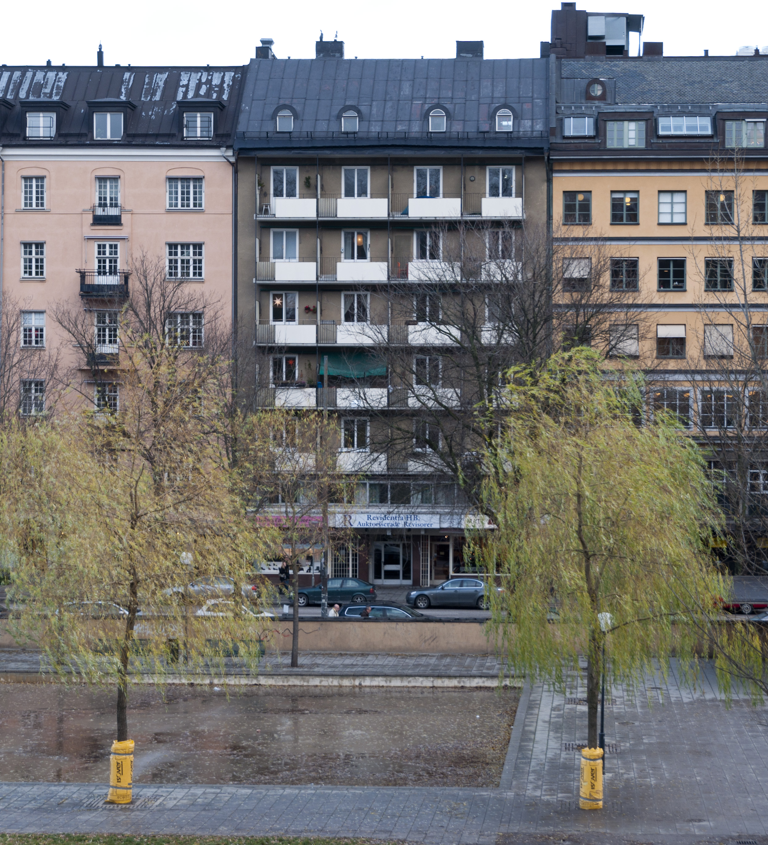 Sveavägen 100, kv Blompottan, Byggnadsår 1929-30, arkitekt Ture Sellman